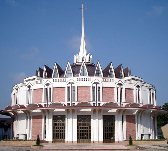 ==Catedrala catolică din Iaşi==